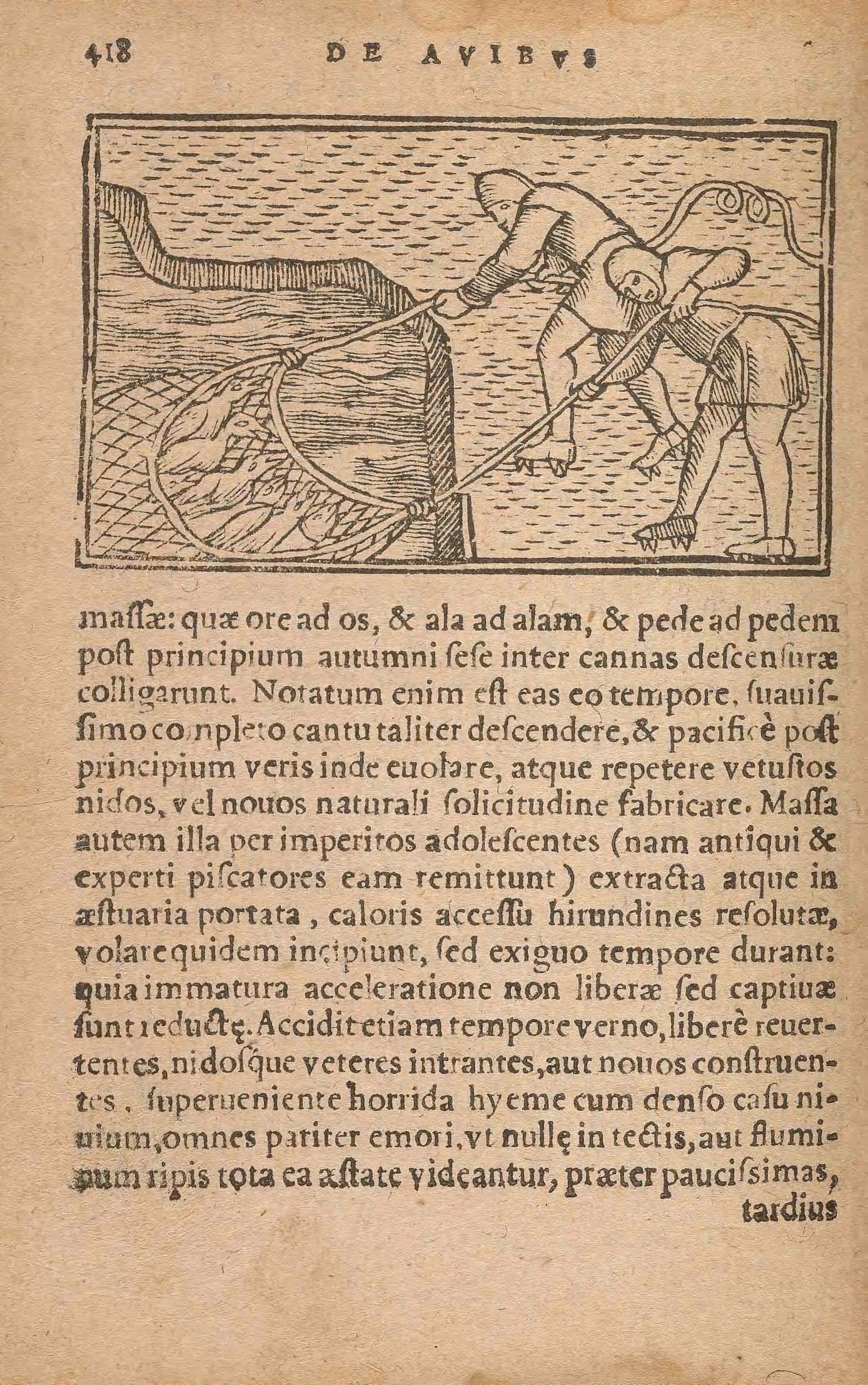 DE AUIBUS massae:quae ore ad os, & ala ad alam, & pede ad pedem post principium autumni sese inter cannas descensurae colligarunt. Notatum enim est eas eo tempore, suaissimo completo cantualiter desendere, & pacificè post principium veris inde euolare, atque repetere vetustos nidos, velnouos naturali solicitudine fabricare. Massa autem illa per imperitos adolescentes (nam antlqui & experti piscatores eam remittunt) extracta atque in aestuaria portata, caloris accessu hirundines resolutae, volarequidem incipiunt, sed exiguo tempore durant: quia immatura acceleratione non liberae sed caitiuae funt reducte. Acciditetiam tempore verno, liberé reuertentes, nidosque veteres intrantes, aut nouos construentes, superueniente horrida hyeme cum denso casu niuium, omnes patiter emori,vt nulle in tectis, aut fluminum ripis tota ea aestate videantur, praeter paucissimas, tardius